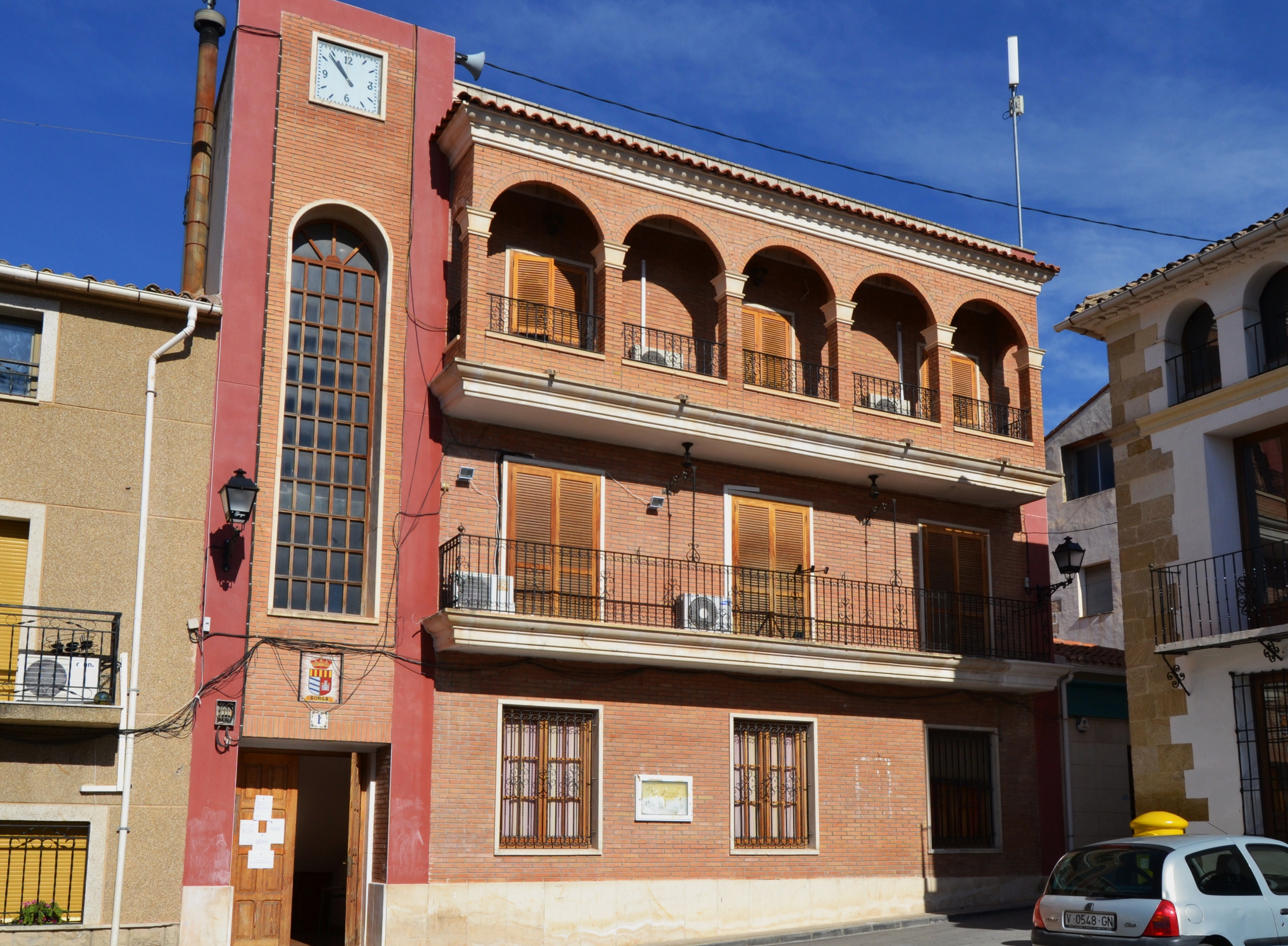 Gorga, ajuntament.